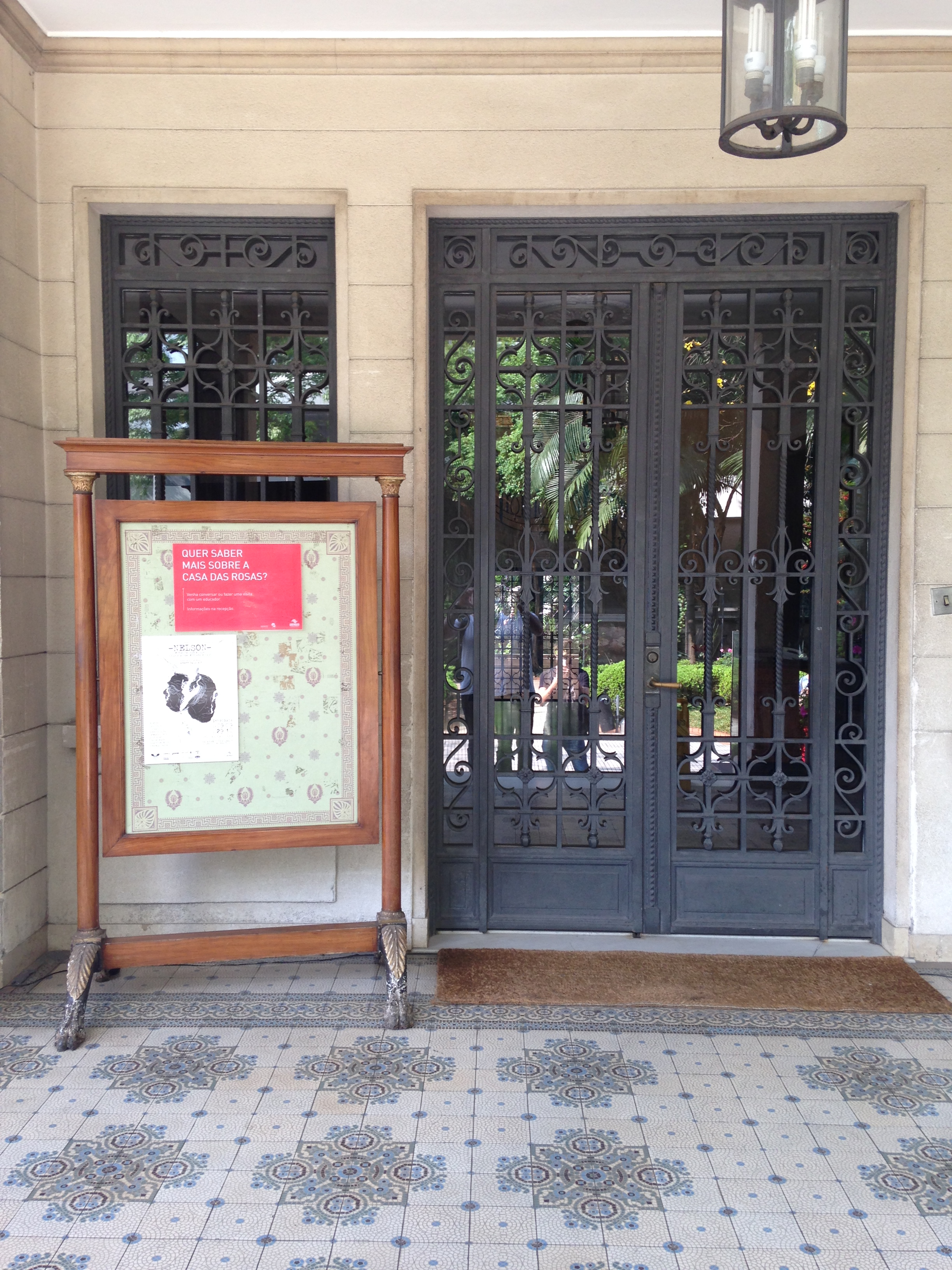 A entrada lateral direita da Casa das Rosas.